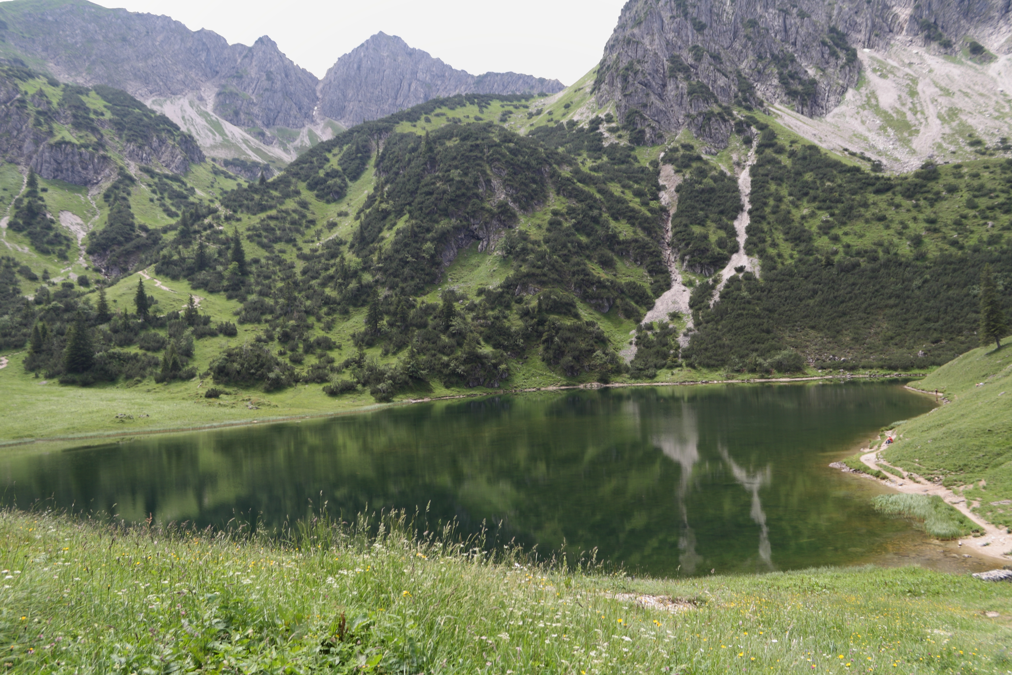 Der Untere Gaisalpsee